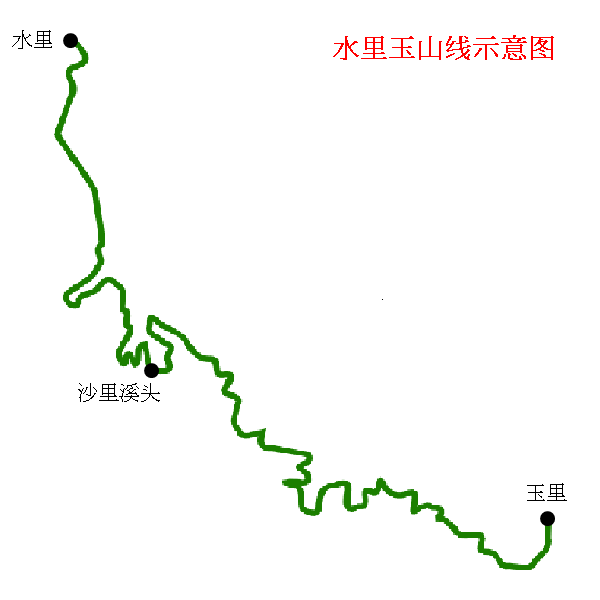 水里玉山线示意图。